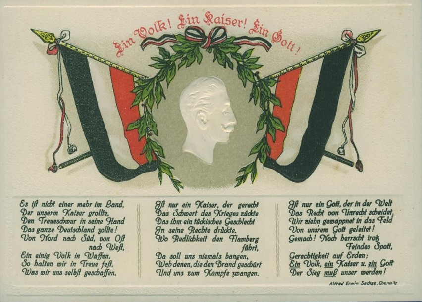 Kaiserpostkarte